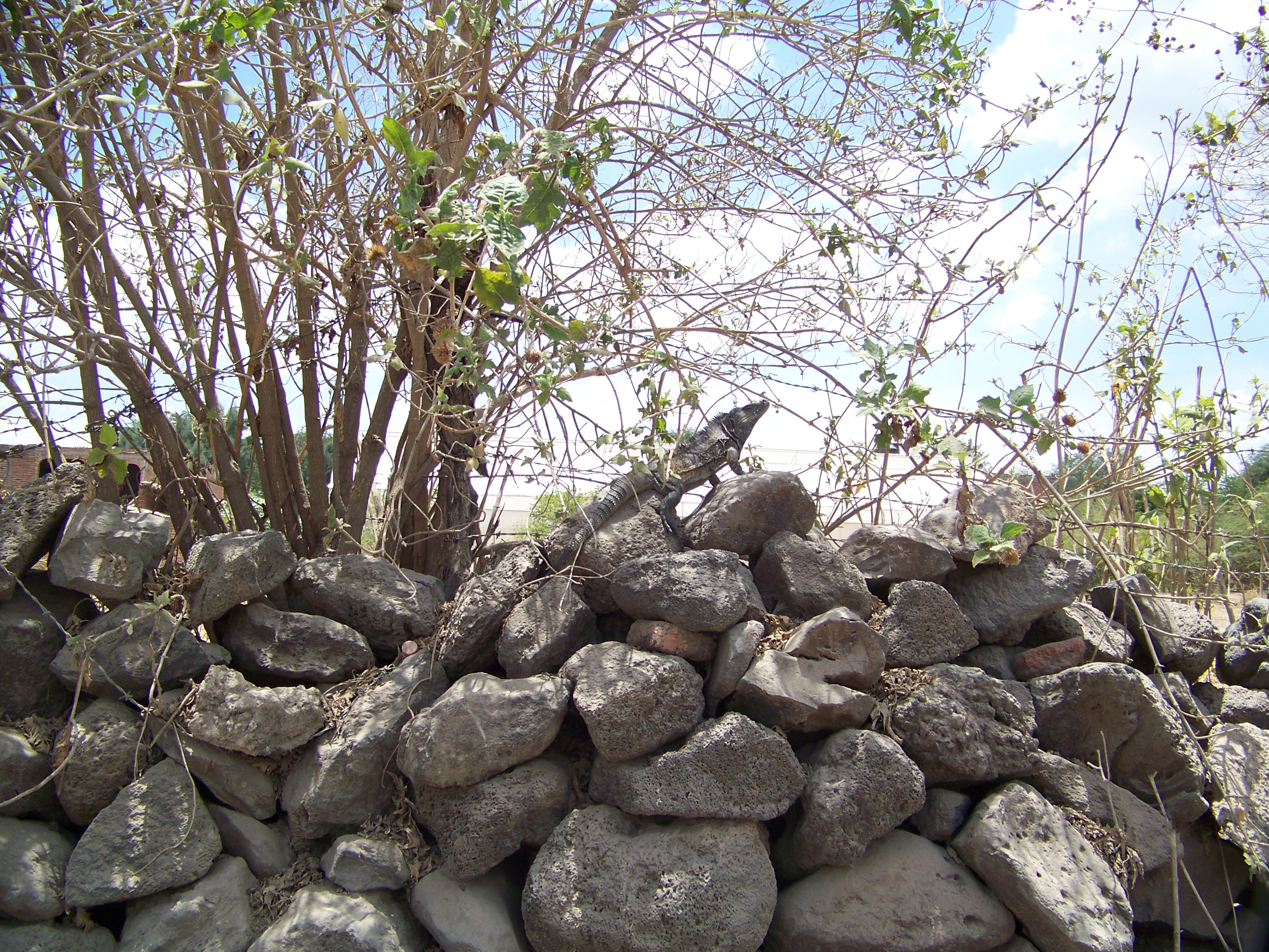 Iguana tomando sol en una cerca de piedra en Atotonilco el Bajo, Jalisco México.